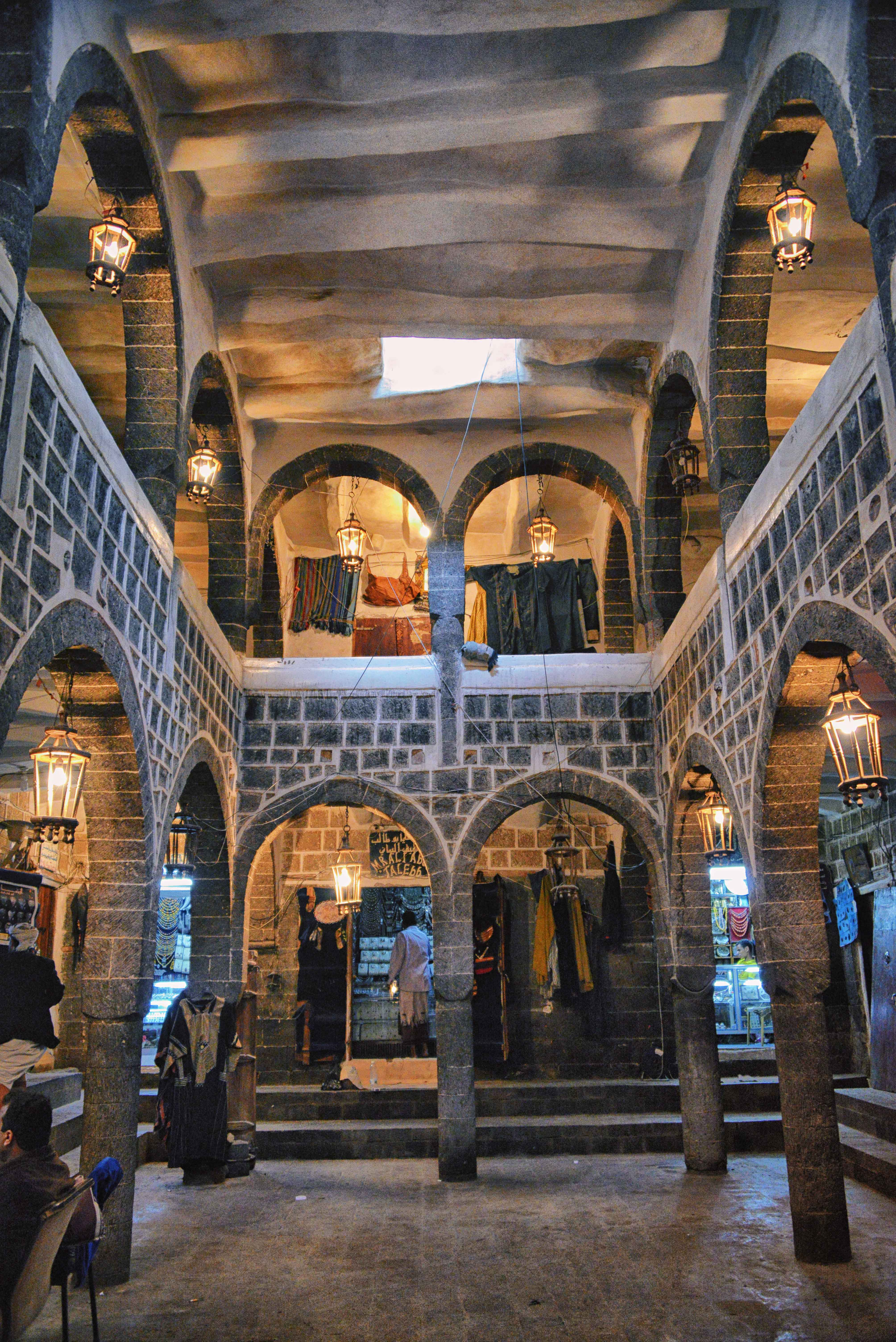 Sana'a, Yemen